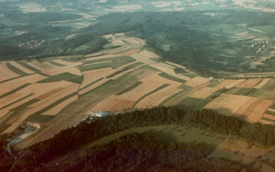 Flugplatz Hetzleser Berg Sommer 68